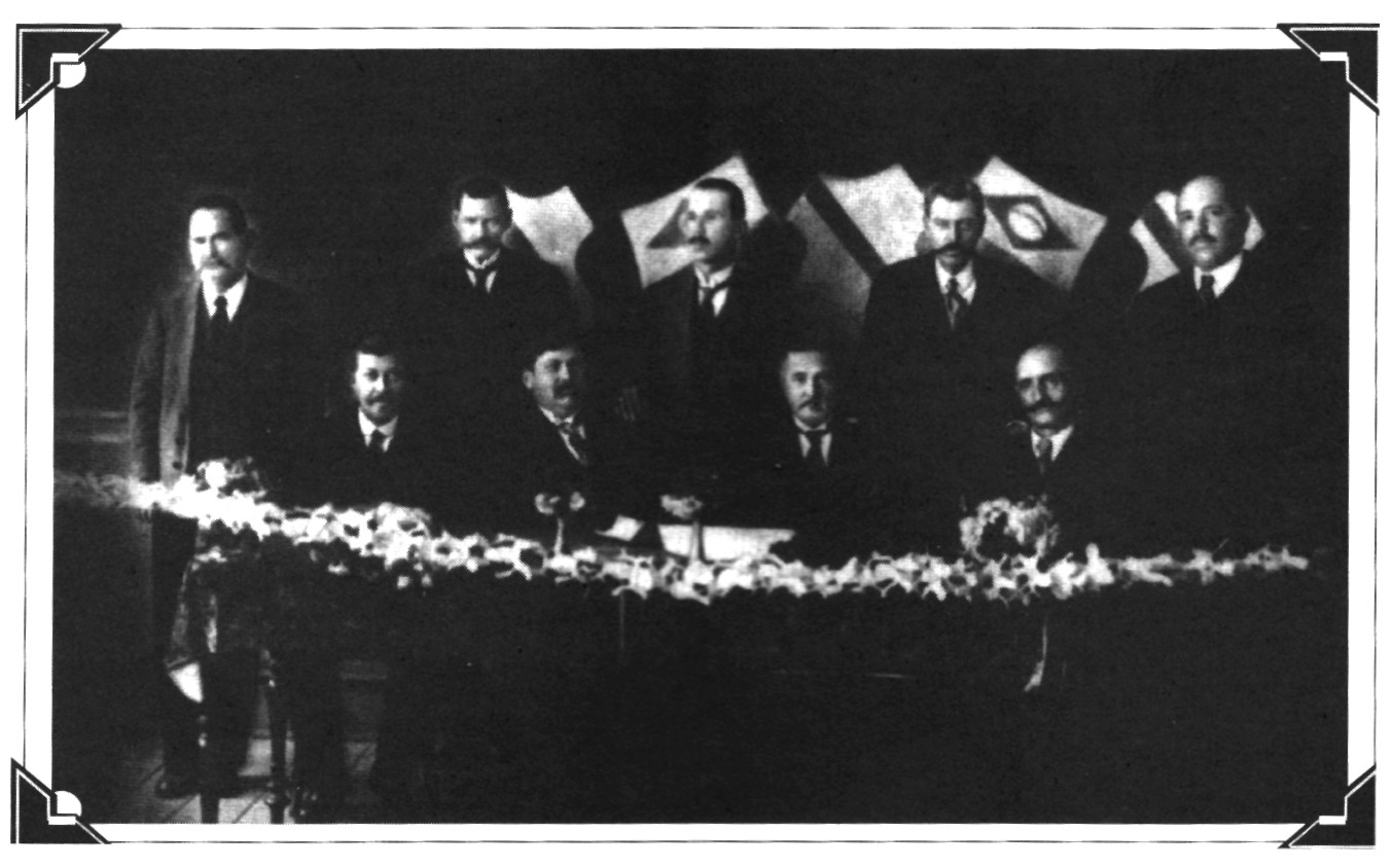 Foto de membros do PRP de Joanópolis.